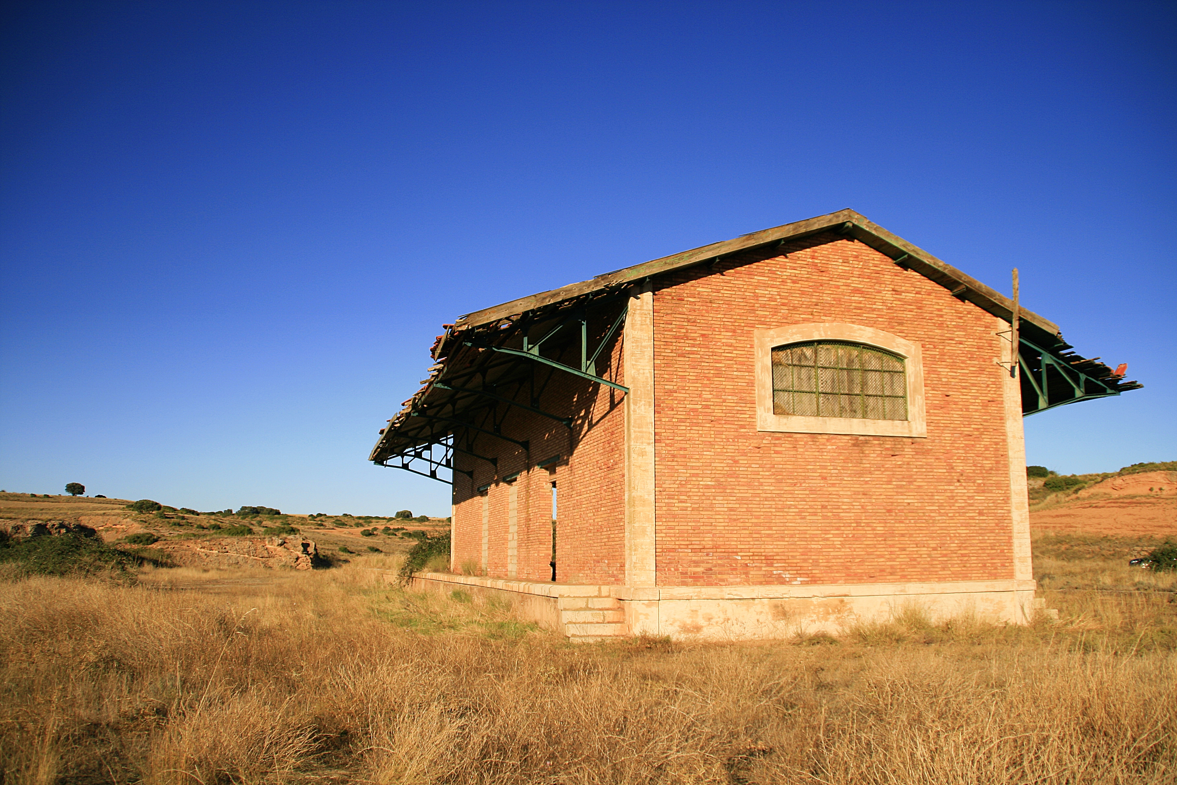 El Ferrocarril Soria-Castejón de Ebro es una línea sin servicio desde 1996 de las que componían la red ferroviaria española, y que comunicaba la ciudad de Soria con la línea Zaragoza - Bilbao en Castejón, discurriendo por la provincia de Soria, La Rioja y Navarra con un trazado de vía única y sin electrificar.